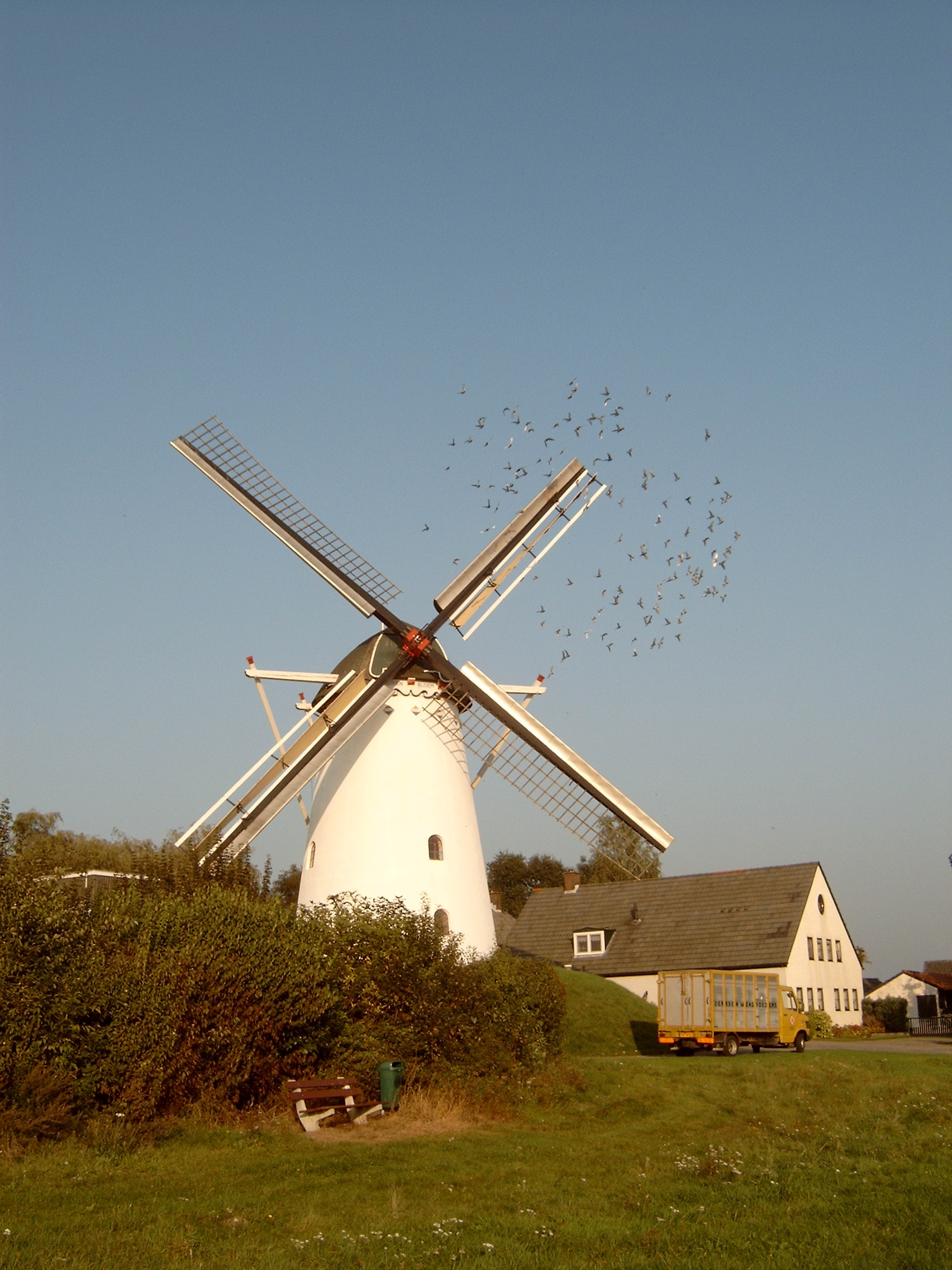 Molen De Korenbloem bij Loil